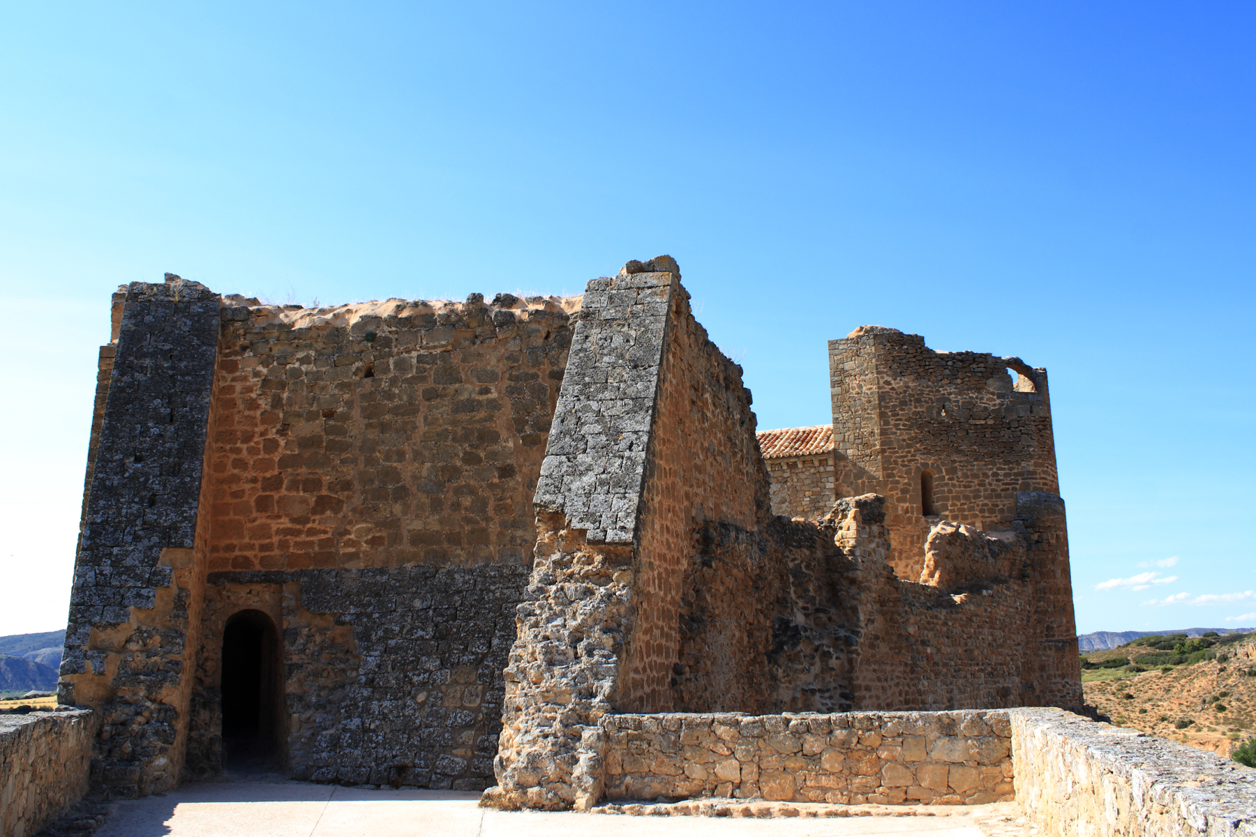 Castillo Zorita de los Canes Provincia de Guadalajara Castilla-La Mancha España